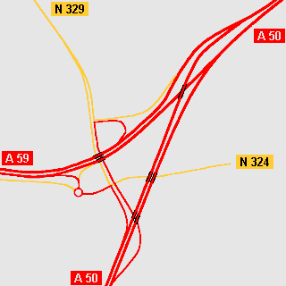 Schematische weergave van onvolledig knooppunt Paalgraven bij Oss (A50 en A59 alsmede N324 en N329)